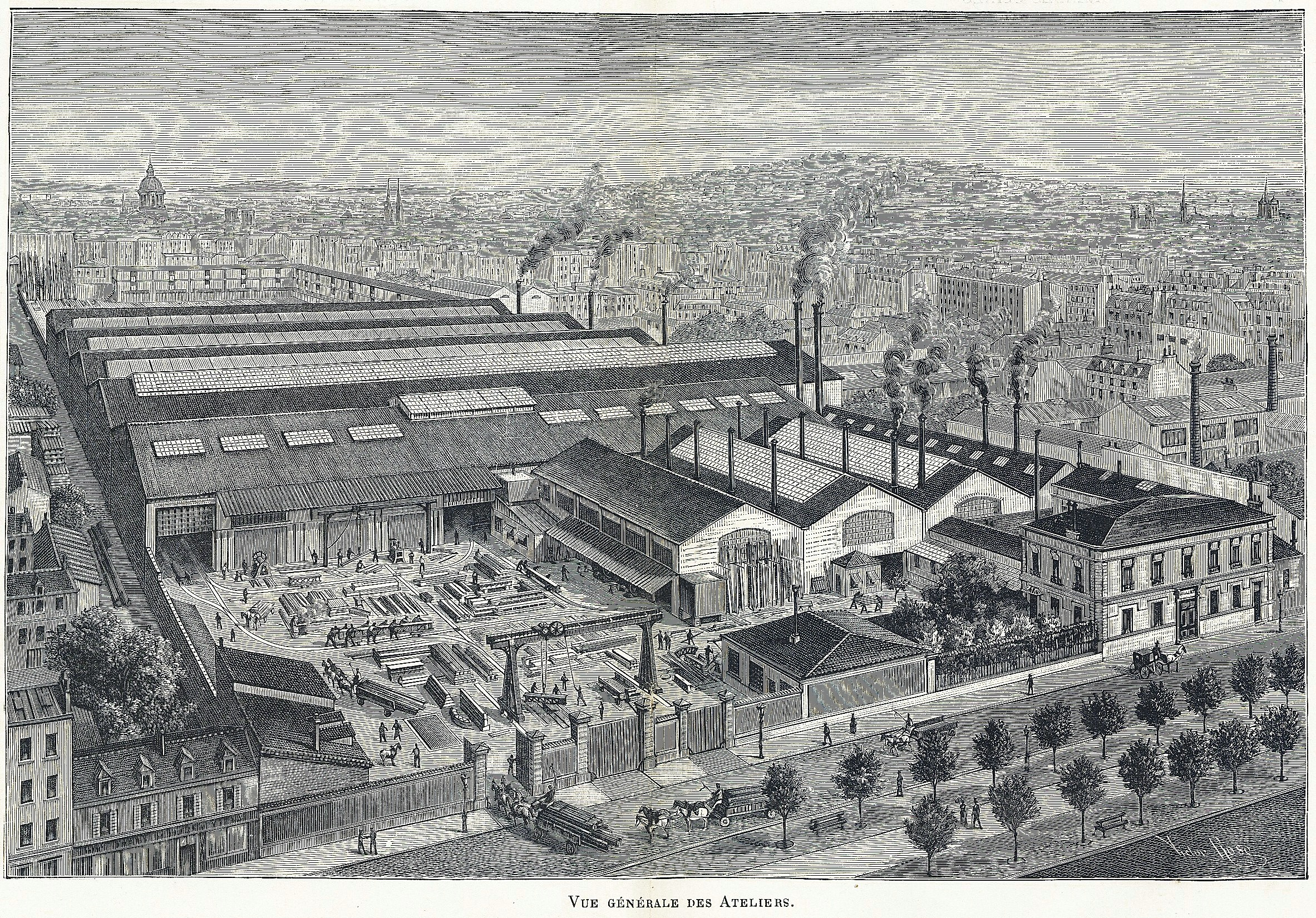 Etablissement Moisant Laurent Savey 1889